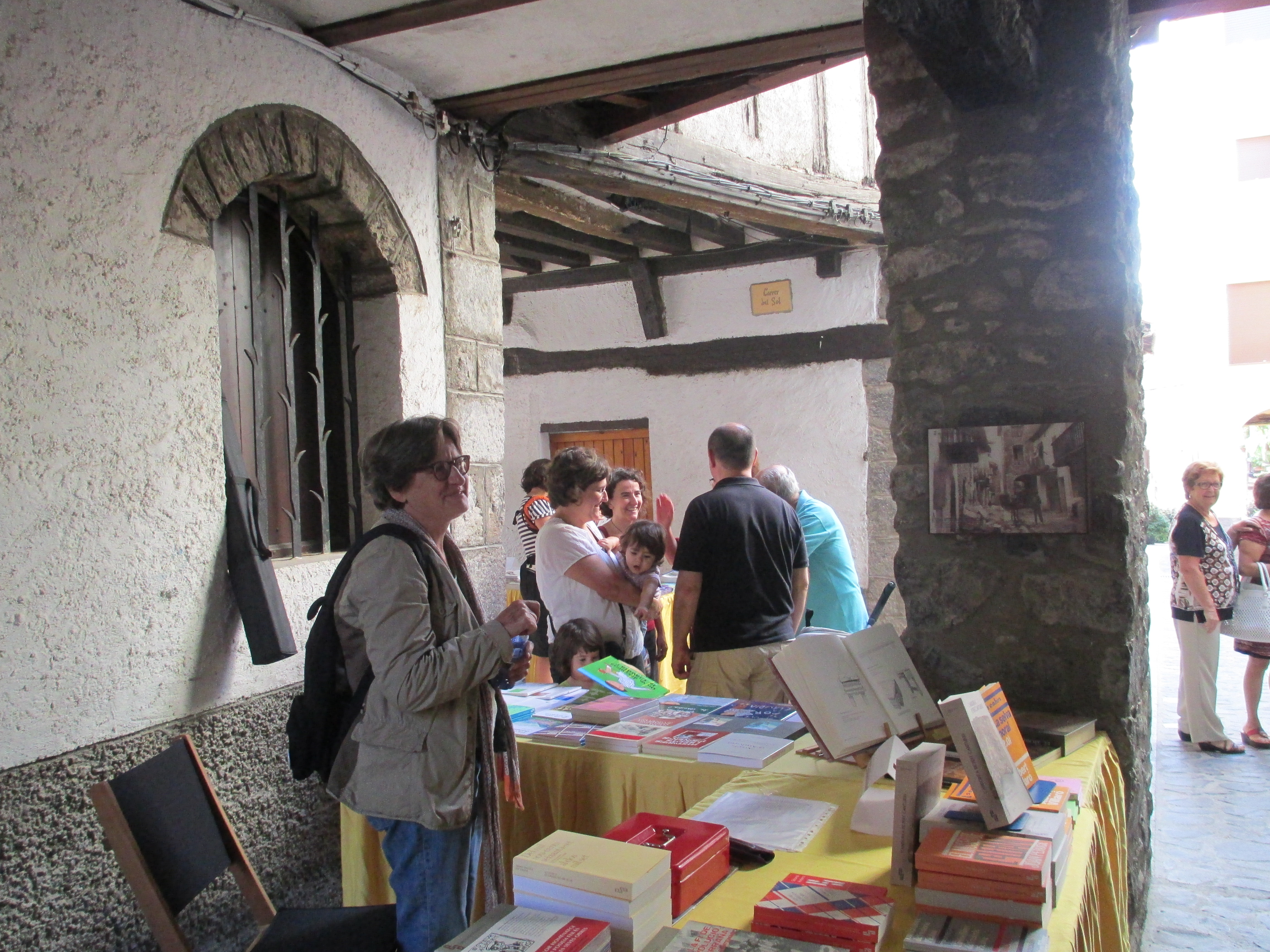 Nucli històric. Organyà.